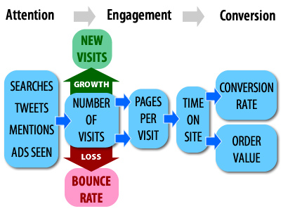 Uso de indicadores